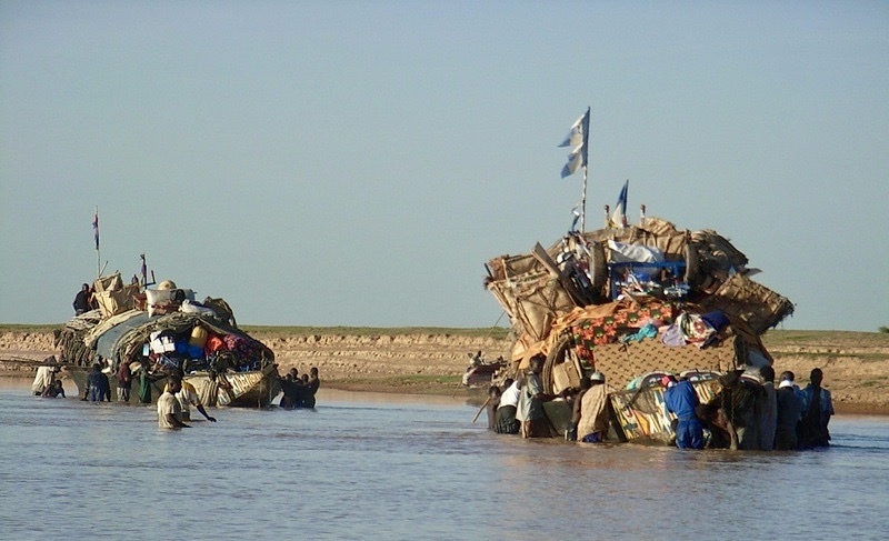 Les pirogues étaient parties de Mopti et tentaient de traverser le Lac Débo. Le niveau de l'eau étaient trop bas. Les hommes étaient dans l'eau pour alléger la charge et tiraient les pirogues. Seul défaut de la photo, son manque de résolution ! Elle a été prise avec un APN de 5mp ! This is an image with the theme "Africa on the Move or Transport" from: Mali